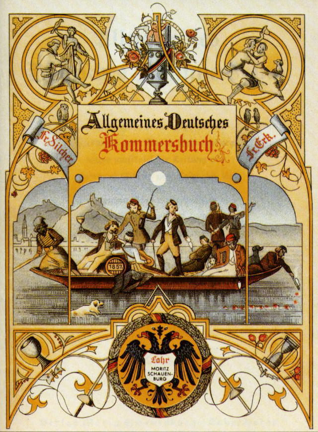 Titelblatt des Allgemeinen Deutschen Kommersbuchs von 1858, Grafik von 1858, Rechte abgelaufen